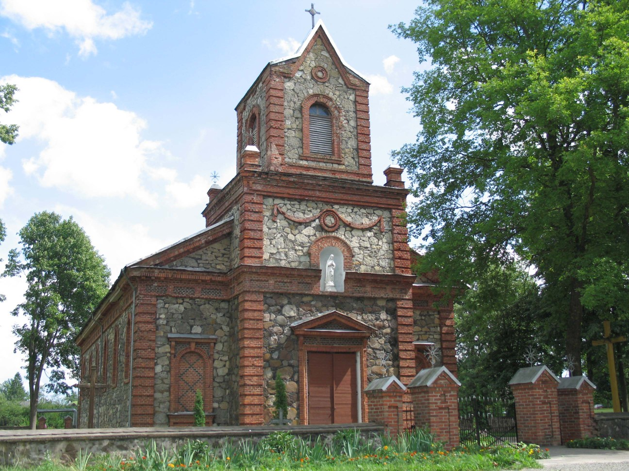 Nemunėlio Radviliškio Švč. Mergelės Marijos bažnyčia